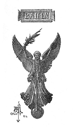 "Bailén" de Benito Pérez Galdós. Ilustraciones de Enrique y Arturo Mélida. Edición de La Guirnalda y Episodios Nacionales, 1882.